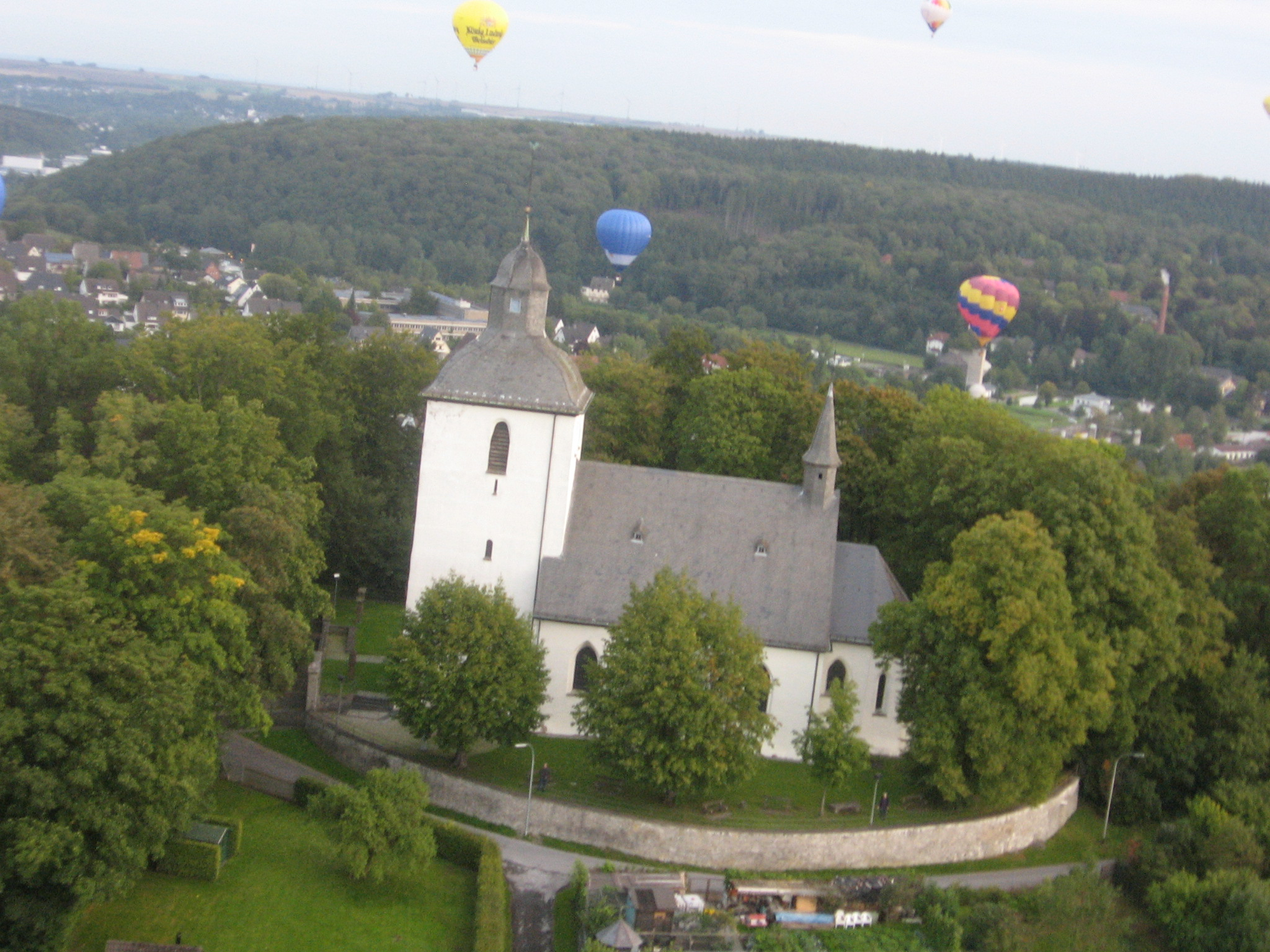 Die "Alte Kirche" in Warstein vom Ballon aus aufgenommen.